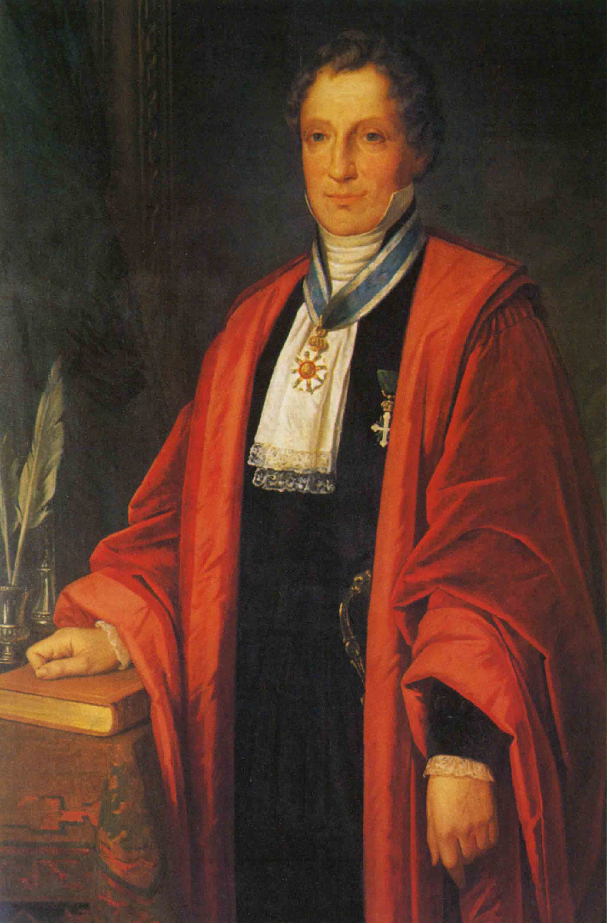 Ritratto di Carlo Tancredi Falletti di Barolo, Marchese di Barolo, Conte dell'impero, Decurione del municipio di Torino e sindaco della ononima Città dal 1826-1827